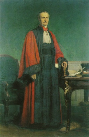 Louis-Marie de Belleyme (1787-1862)